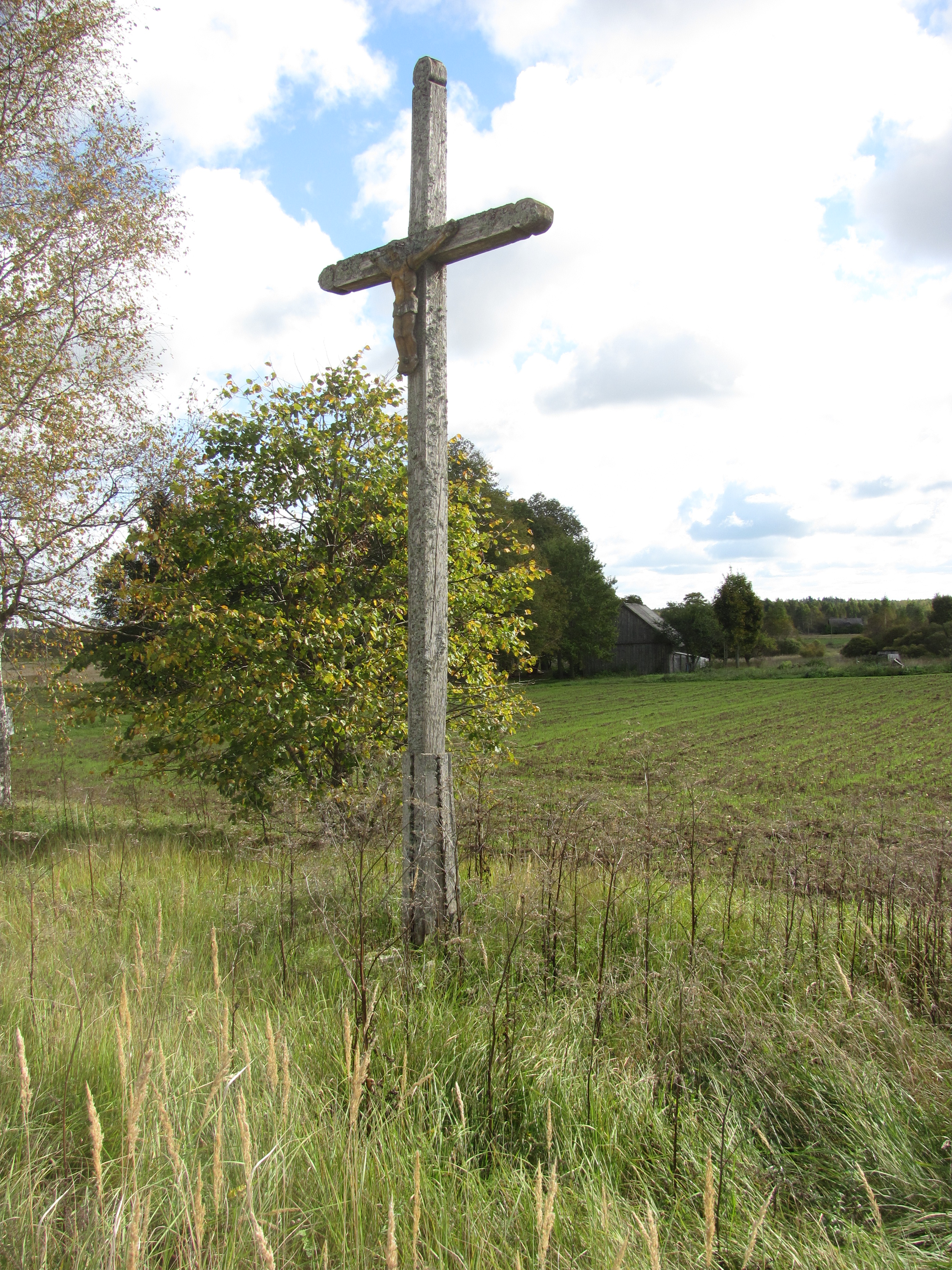 Jūžintų sen., Lithuania